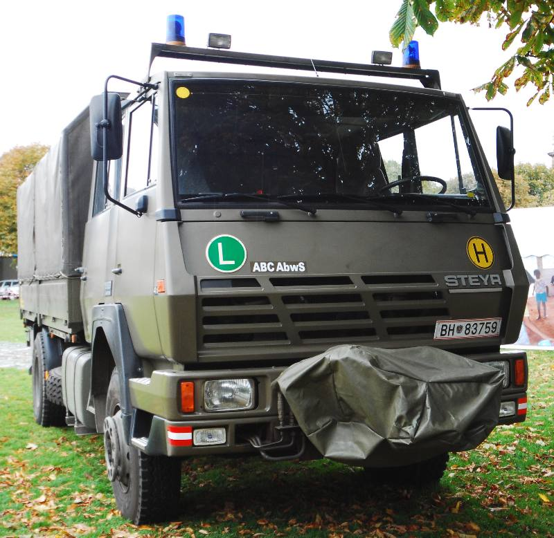 Steyr LKW 19 S 27